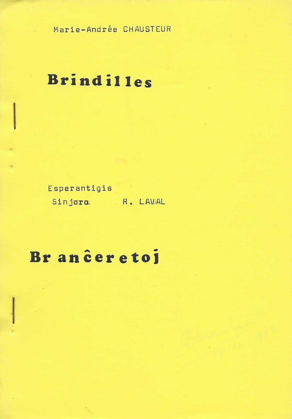 librokovrilo de "Branĉeretoj", 1980